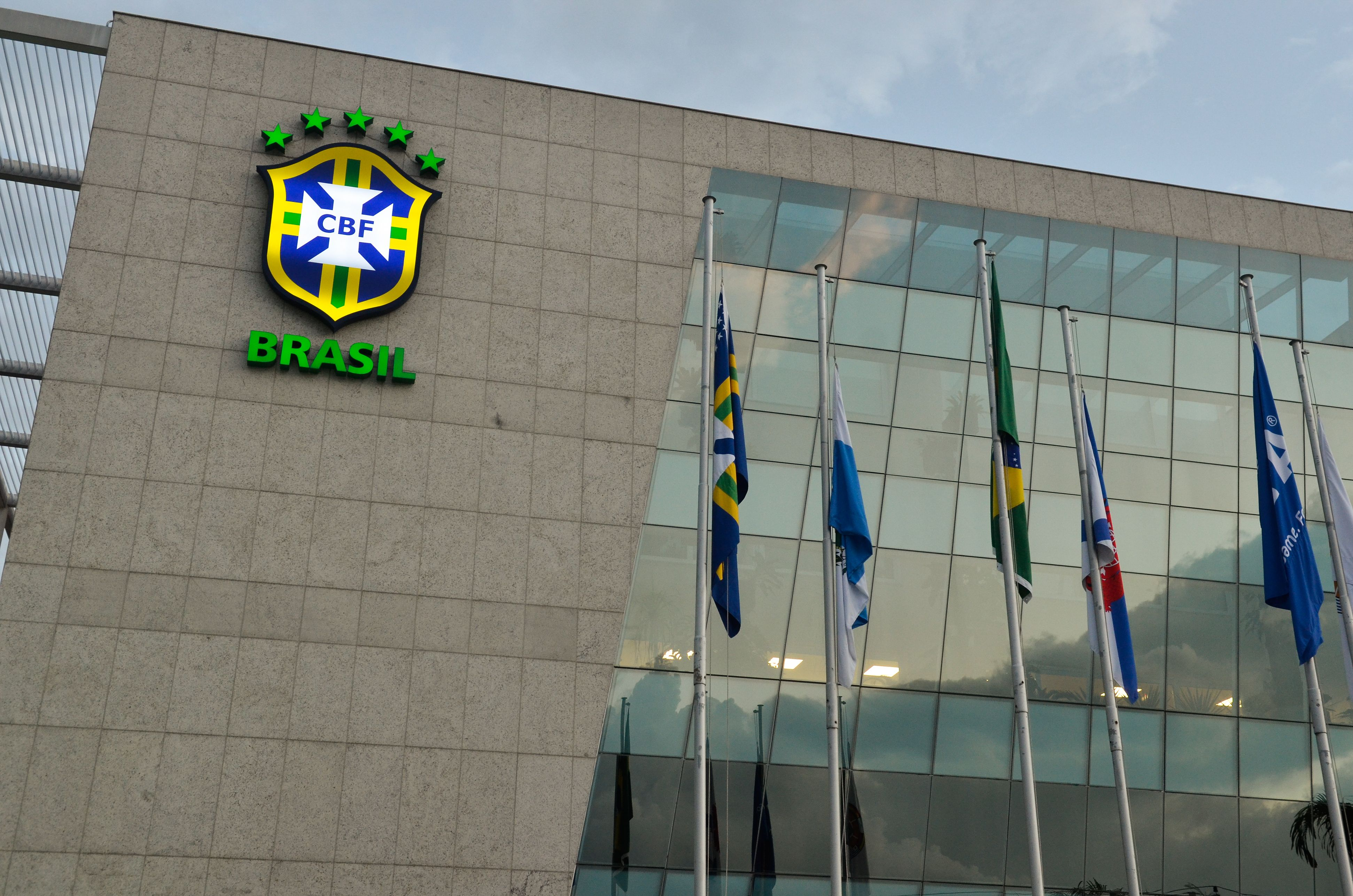 Sede da Confederação Brasileira de Futebol (CBF), na Barra da Tijuca, no Rio de Janeiro.